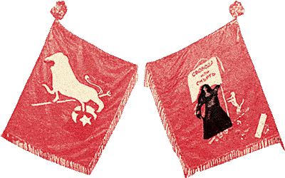 Револуционерното знаме извезено во Струга (1903)